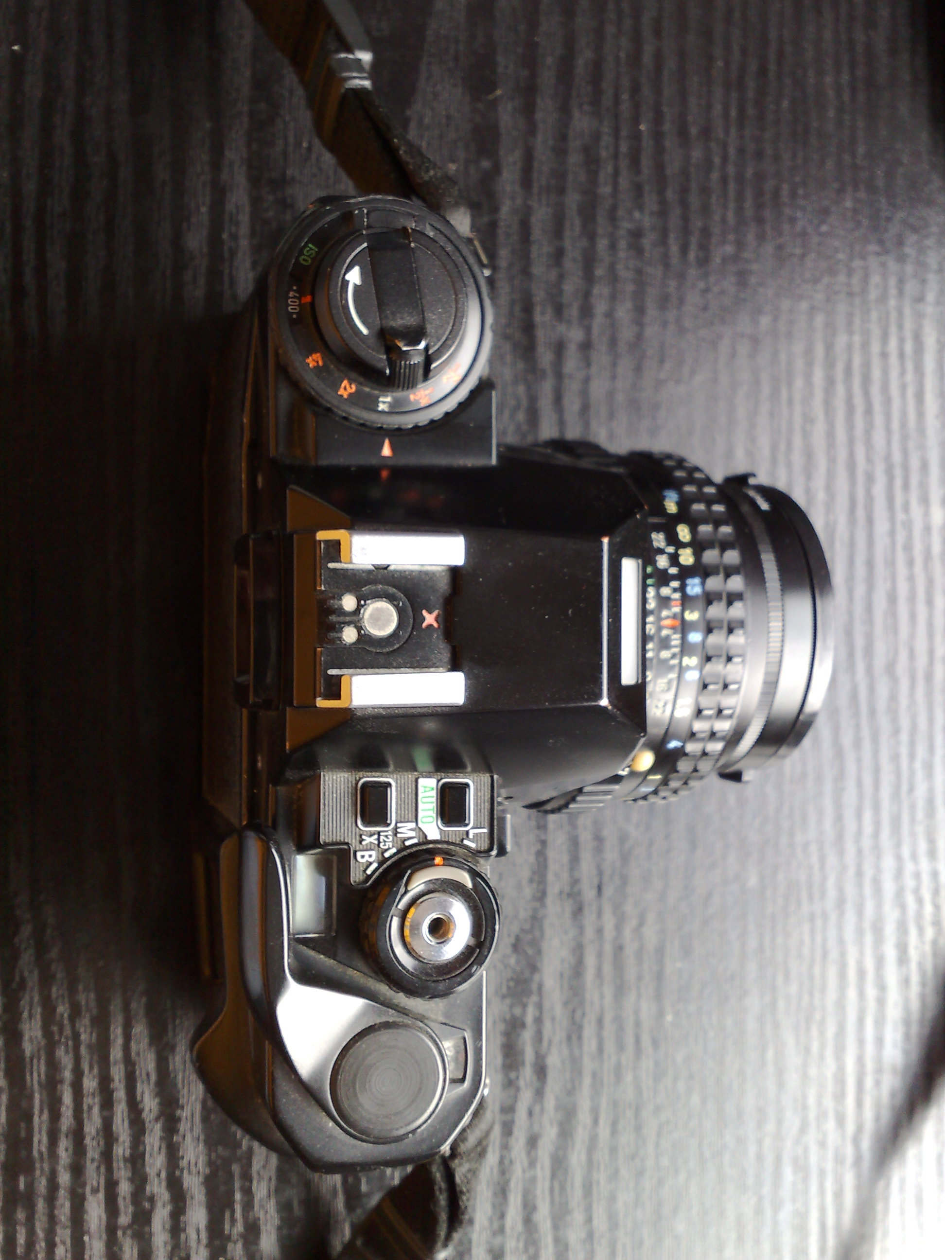 Pentax Super-A camera (top)